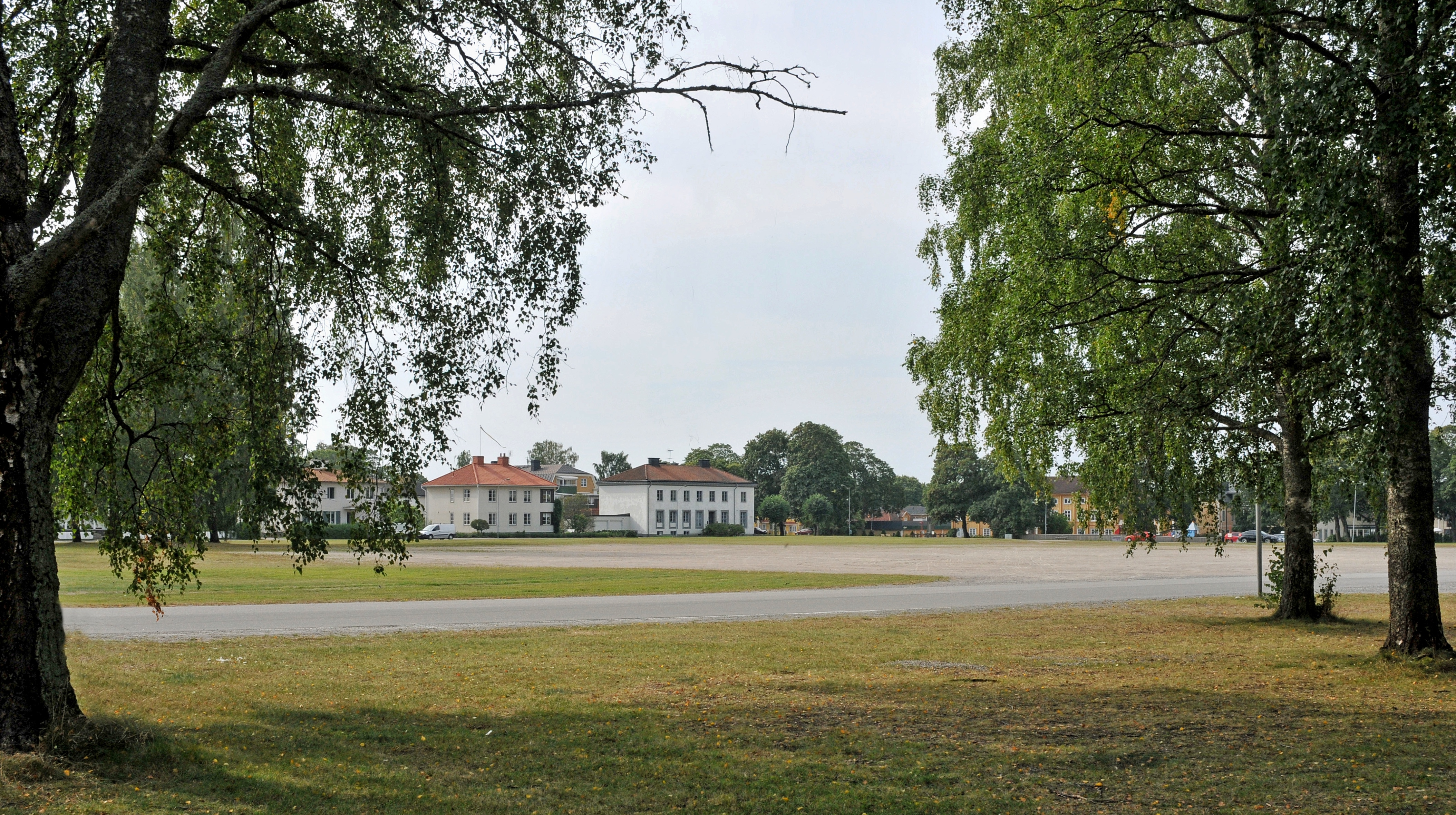 Malma heds tidigare exercisplats för Södermanlands regemente i Malmköping